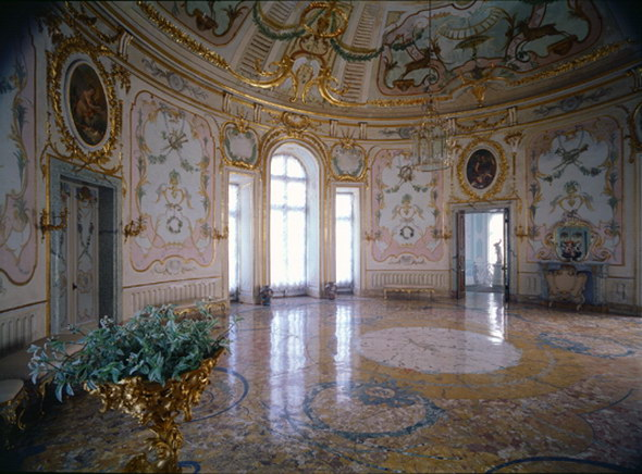 ОРАНИЕНБАУМ. КАТАЛЬНАЯ ГОРКА. КРУГЛЫЙ ЗАЛ